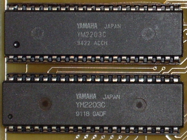 Две микросхемы звукогенератора YM2203C производства Yamaha, 1991 и 1994 года выпуска.